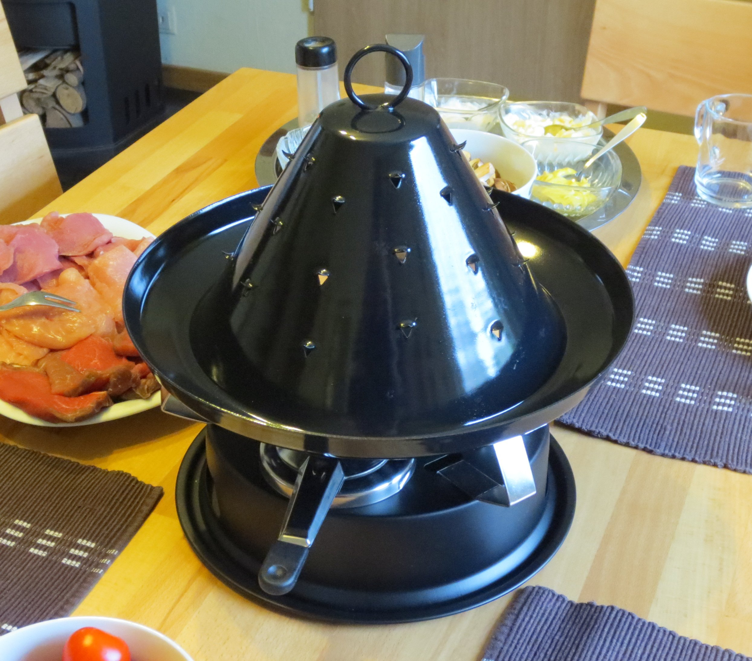 Tatarenhut vor Benutzung und vorbereitetes Grillgut.